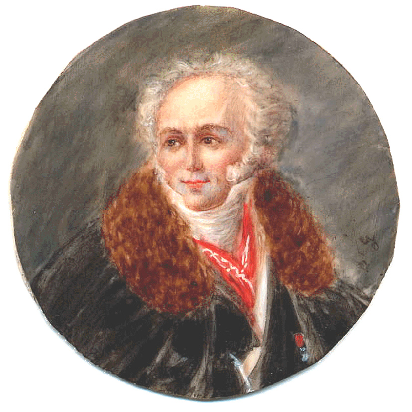 firmado por Baron Gérard en la parte inferior del retrato. ( B G )